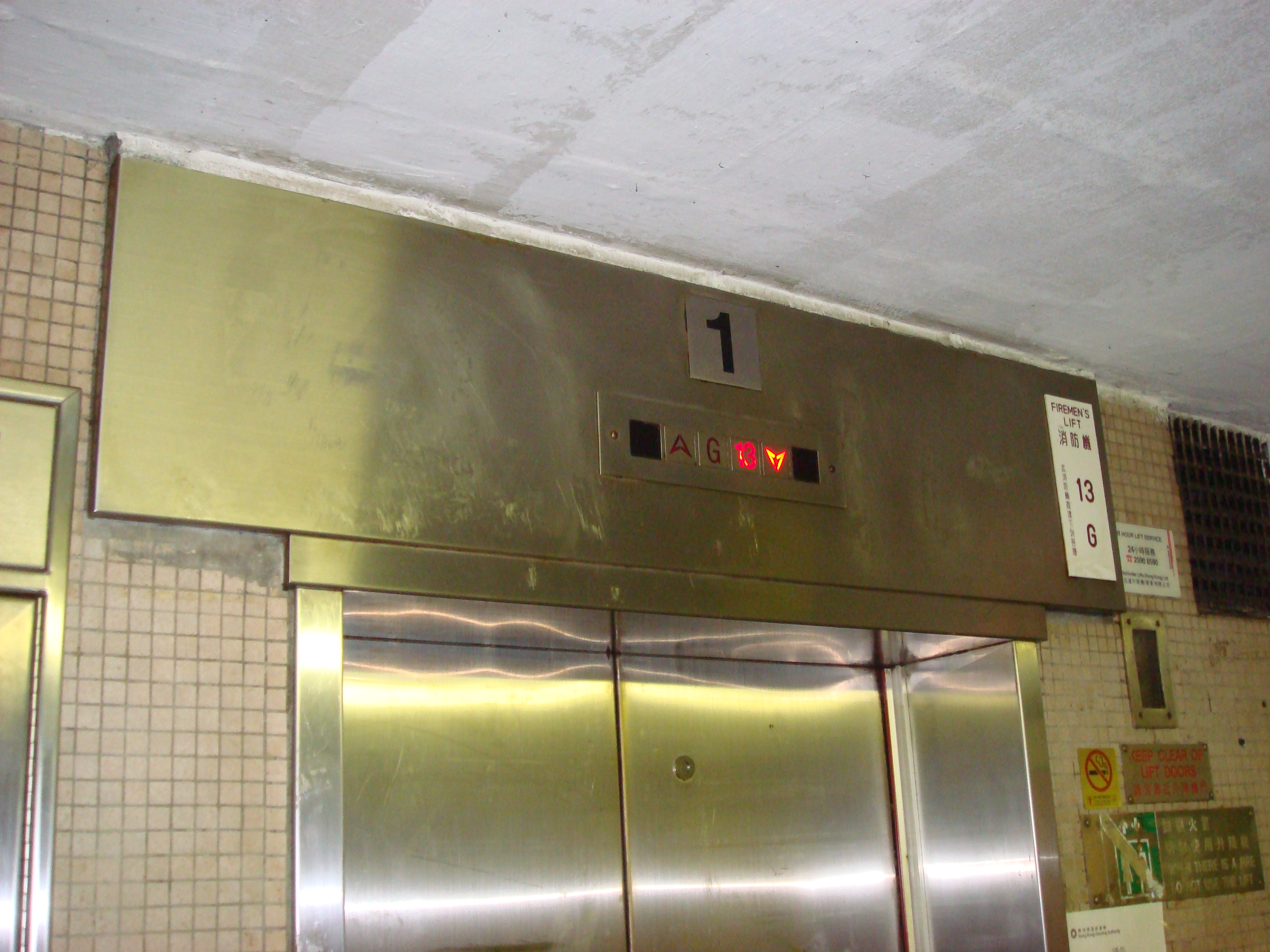 Lower Ngau Tau Kok Estate, Hong Kong